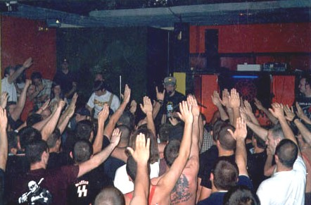 Concierto de Batallón de Castigo